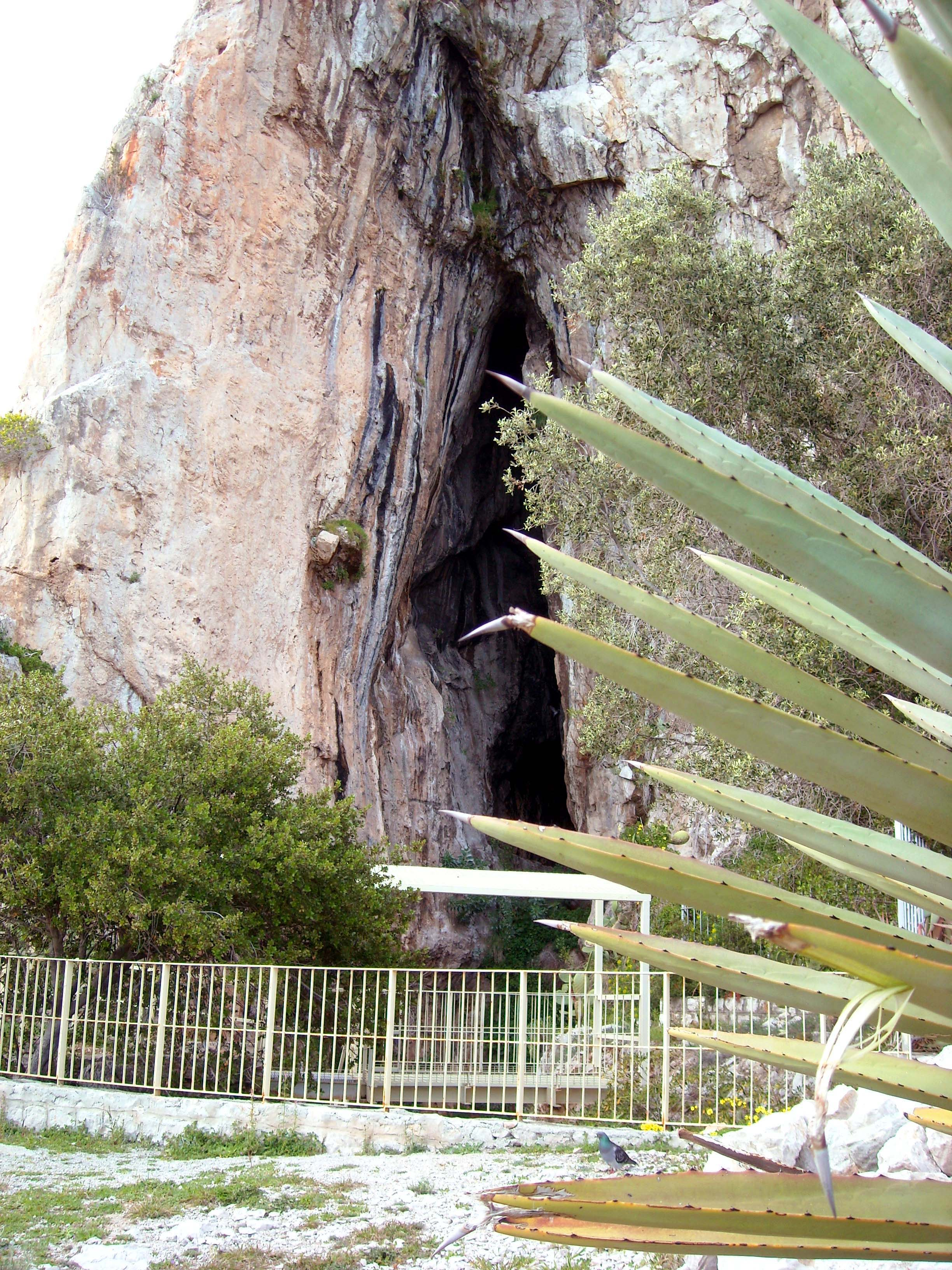 La grotta Barma Grande dei balzi Rossi a Ventimiglia, Italia.